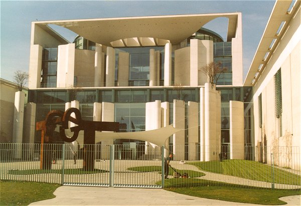 Het kantoor van de Duitse bondskanselier, gelegen tegenover de Reichtstag. Foto april 2005.